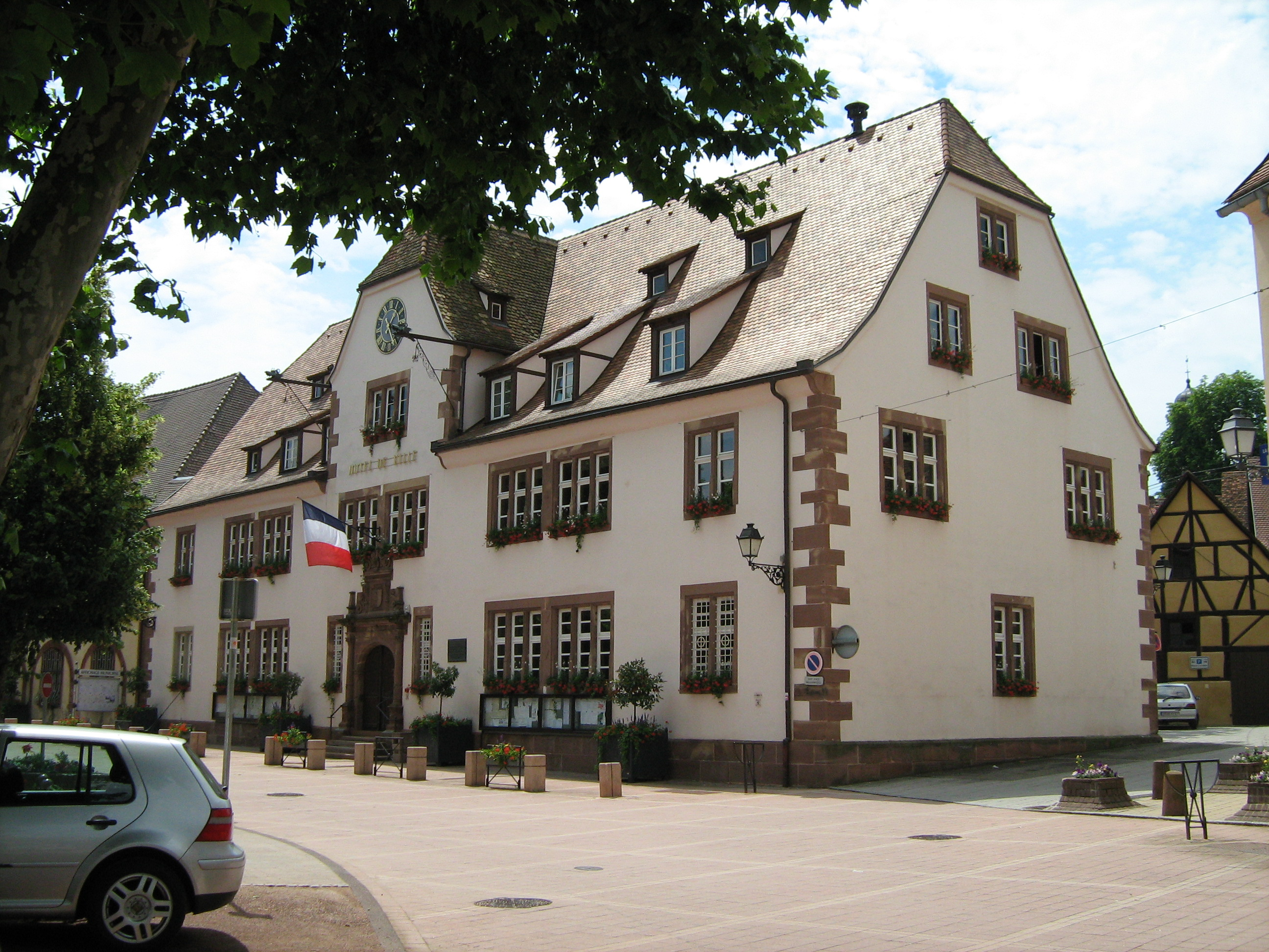 Mairie de Bouxwiller (67)